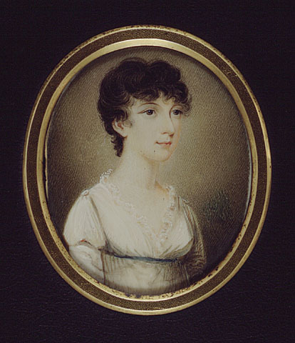 Title / Titre :Eweretta Jane Richardson (Mrs. Alexander Auldjo) Creator(s) / Créateur(s) : Sampson Towgood Roch (1759-1847) Date(s) : ca. 1798-1800 Reference No. / Numéro de référence : MIKAN 2837338 / C-136995 Credit / Mention de source : Library and Archives Canada, C-136995 / Bibliothèque et Archives Canada, C-136995 Description / Descriptions : Born in Portsoy, Scotland, Eweretta Jane Richardson (1774-1808) was the cousin of John Richardson, a prominent Montreal businessman and politician. In 1804, in Portsoy, she married Alexander Auldjo, a Scottish-born Montreal businessman, and then immigrated to Canada. This possible sole likeness of the sitter was painted before she came to Canada, at Bath where the artist lived. Eweretta died in childbirth only four years later, after her arrival in Canada. The artist who also signed his name "Roche," invariably gives his sitters a characteristic smile or smirk, evident in this portrait miniature. / Née à Portsoy en Écosse, Eweretta Jane Richardson (1774-1808) était la cousine de John Richardson, éminent homme d'affaires et politicien montréalais. En 1804, elle épousa à Portsoy Alexander Auldjo, homme d'affaires montréalais d'origine écossaise, puis émigra au Canada. Eweretta mourut en donnant naissance à un enfant quatre ans seulement après son arrivée au Canada. Ce portrait d'elle, probablement unique, fut peint avant son arrivée au Canada, à Bath, où vivait l'artiste. Ce dernier, qui signait aussi du nom de « Roche », donnait invariablement à ses sujets un petit sourire caractéristique, qui se voit bien dans ce portrait miniature.